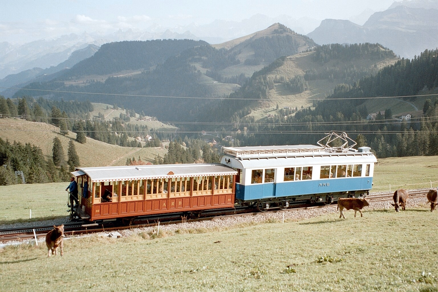 Switzerland Arth Rigi Bahn near Station Staffelhöhe